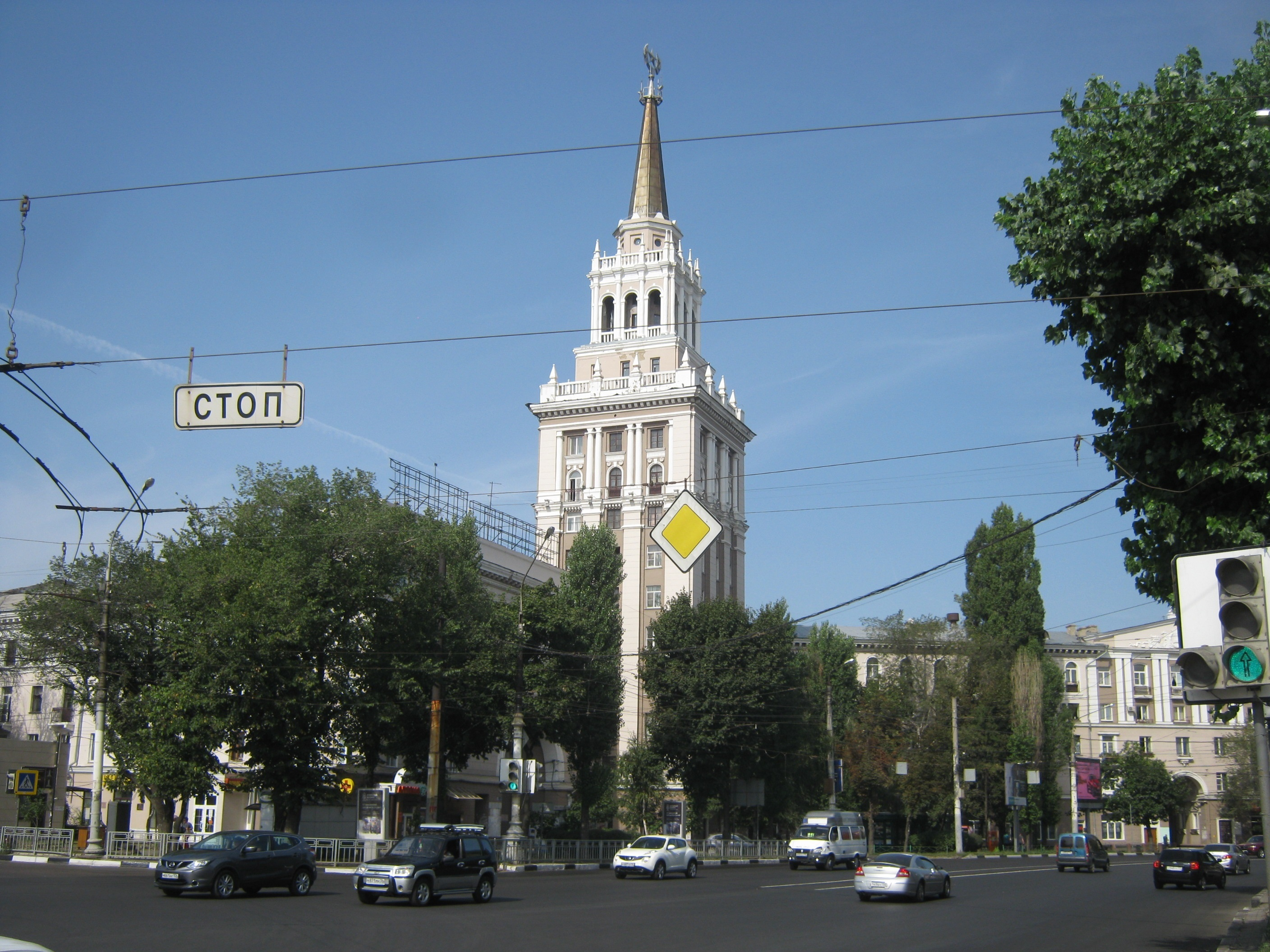 Дом у Девицкого выезда (Воронеж)